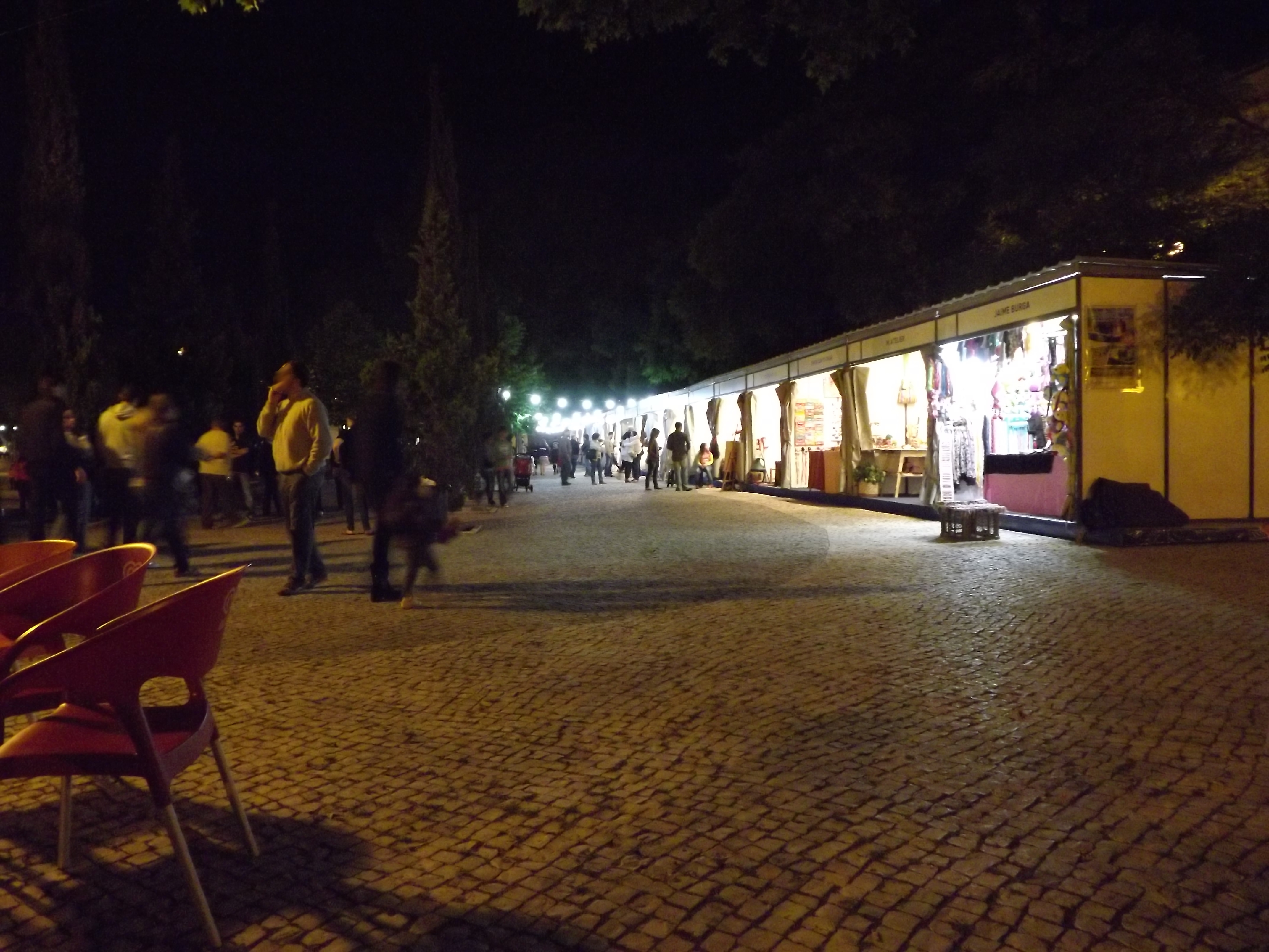 Perspetiva sobre uma parte do espaço onde decorreu a festa